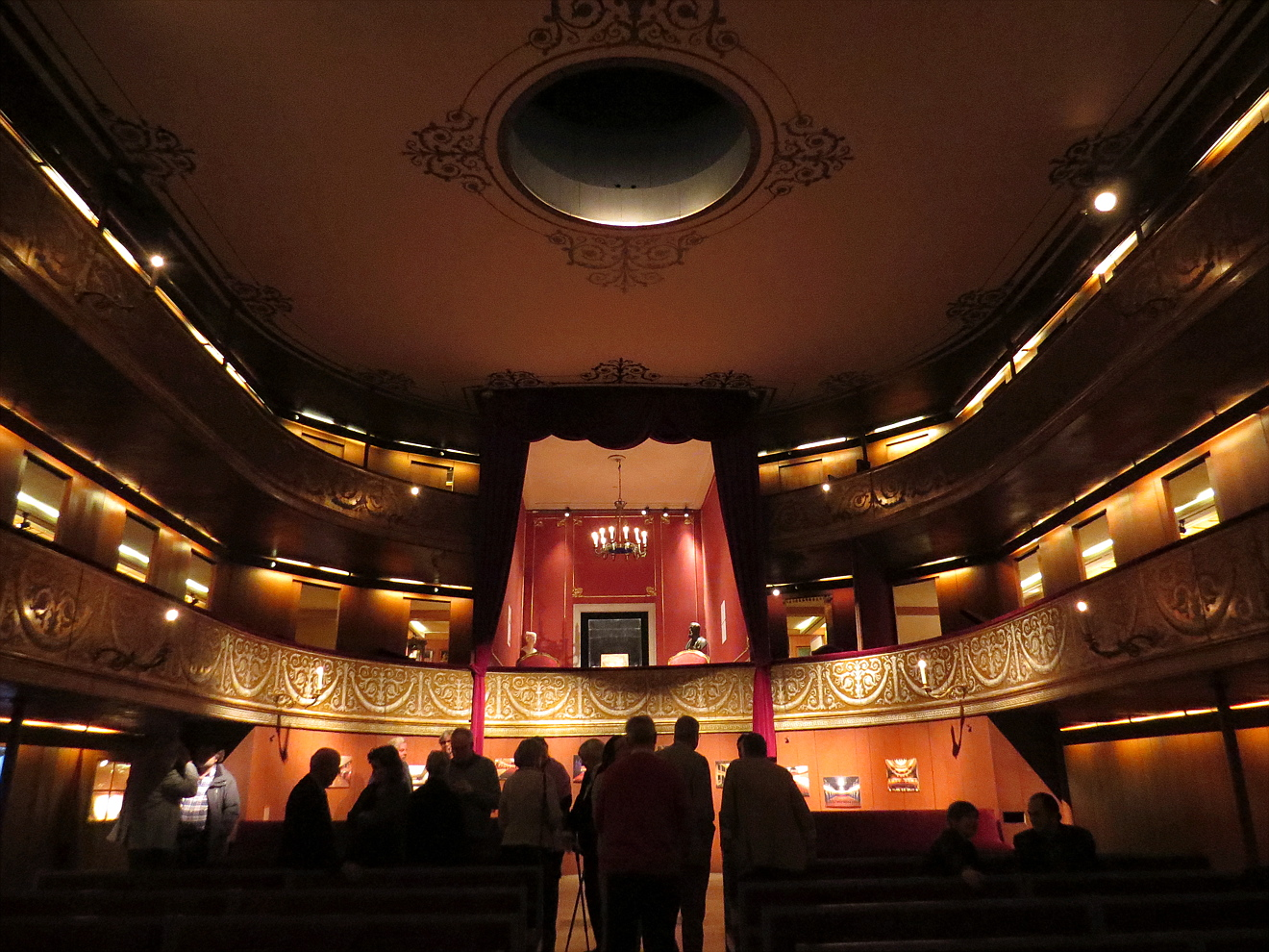 Hofteatret i Christiansborg, med kongelogen i baggrunden, København